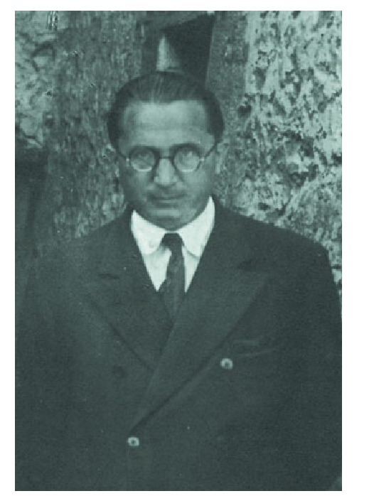 Nikolas Ormaetxea «Orixe», Euskaltzaleak elkarteak sustaturiko euskal Pizkundeko idazle nagusietakoa.